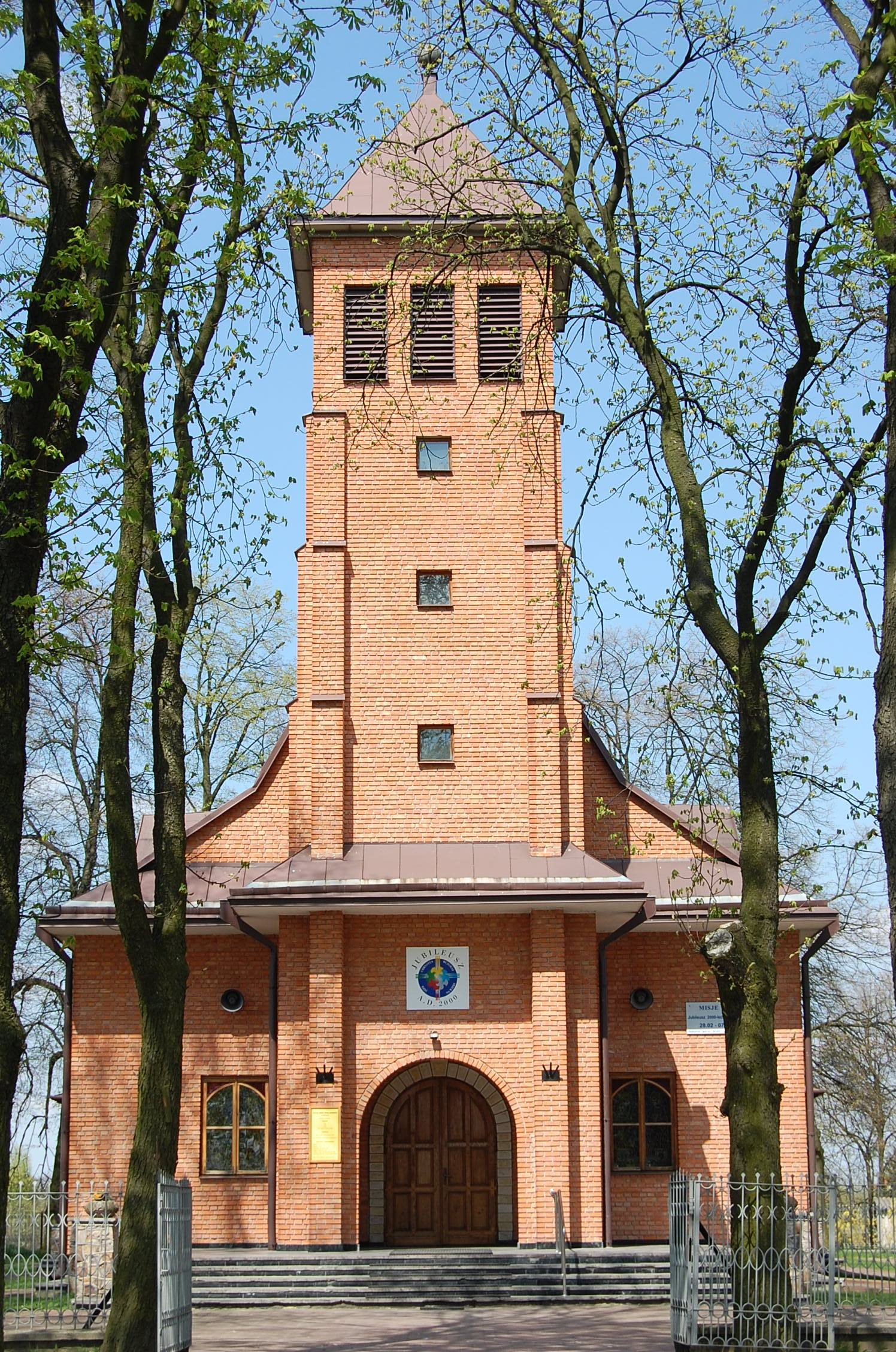 Budynek nowego kościoła w Motyczu